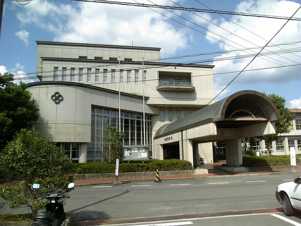 和束町役場